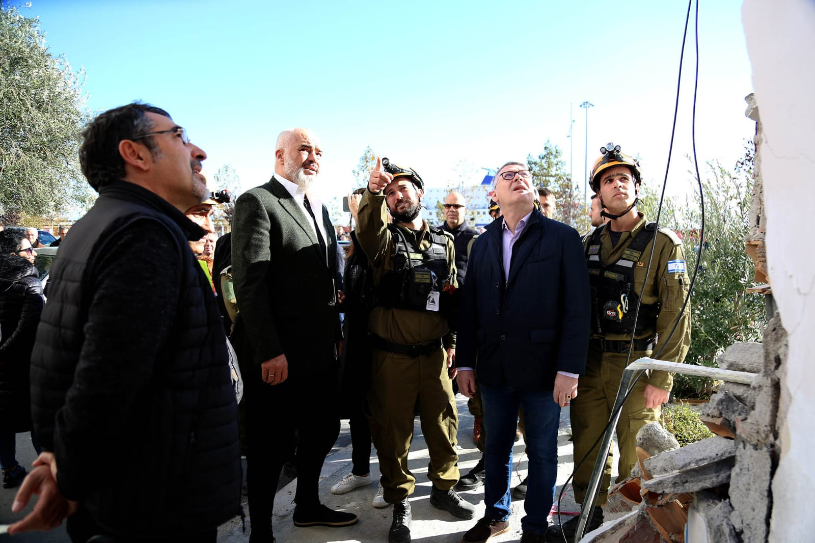 משלחת פיקוד העורף לרעידת האדמה באלבניה.